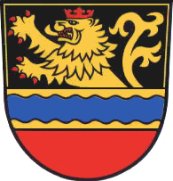 Wappen der ehemaligen Gemeinde Aga